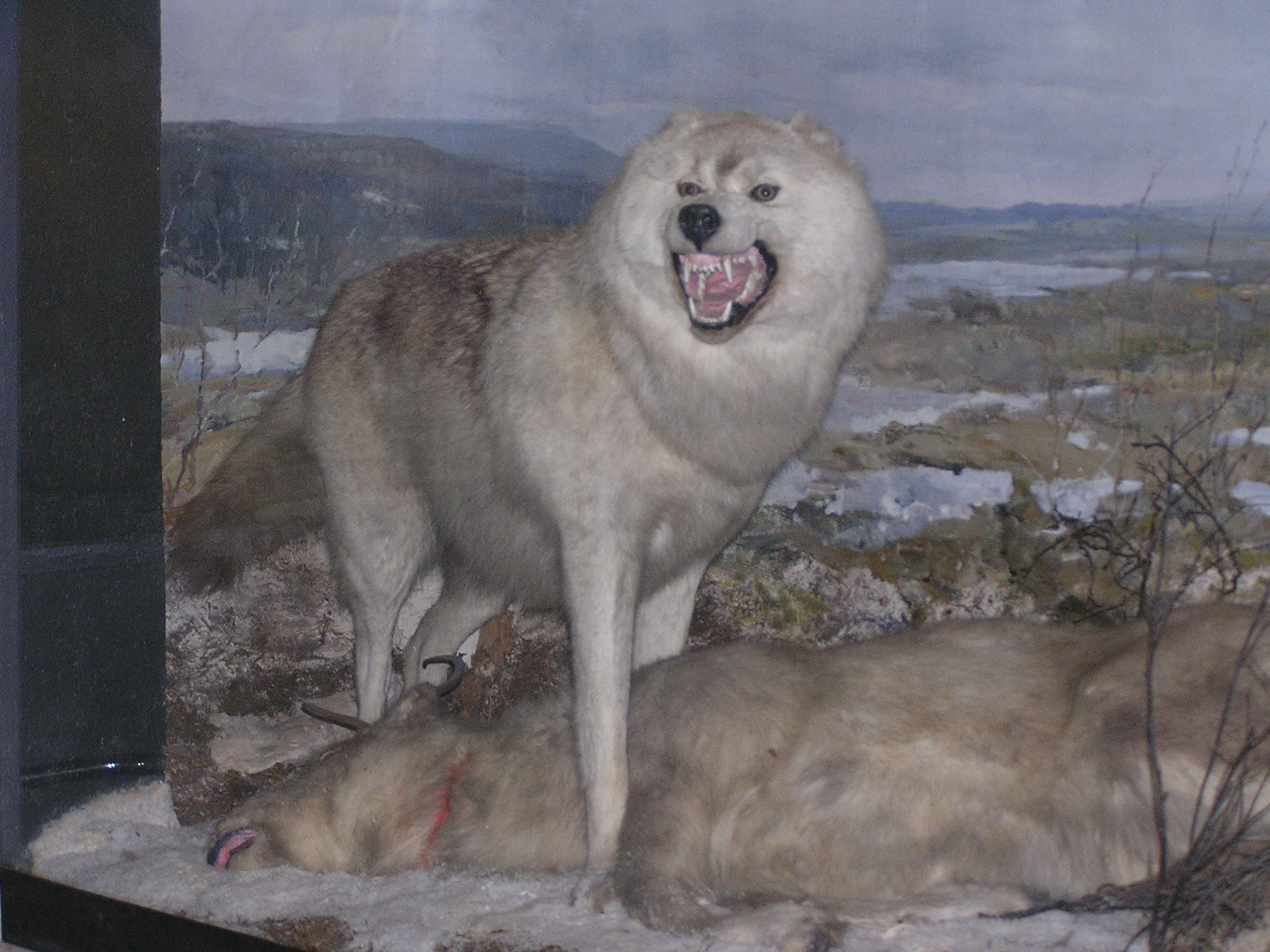 Зоологический музей в Санкт-Петербурге. Волк